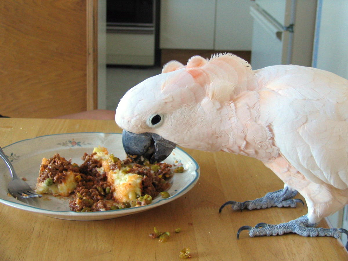 Moluccan Cockatoo, Cacatua molucensis